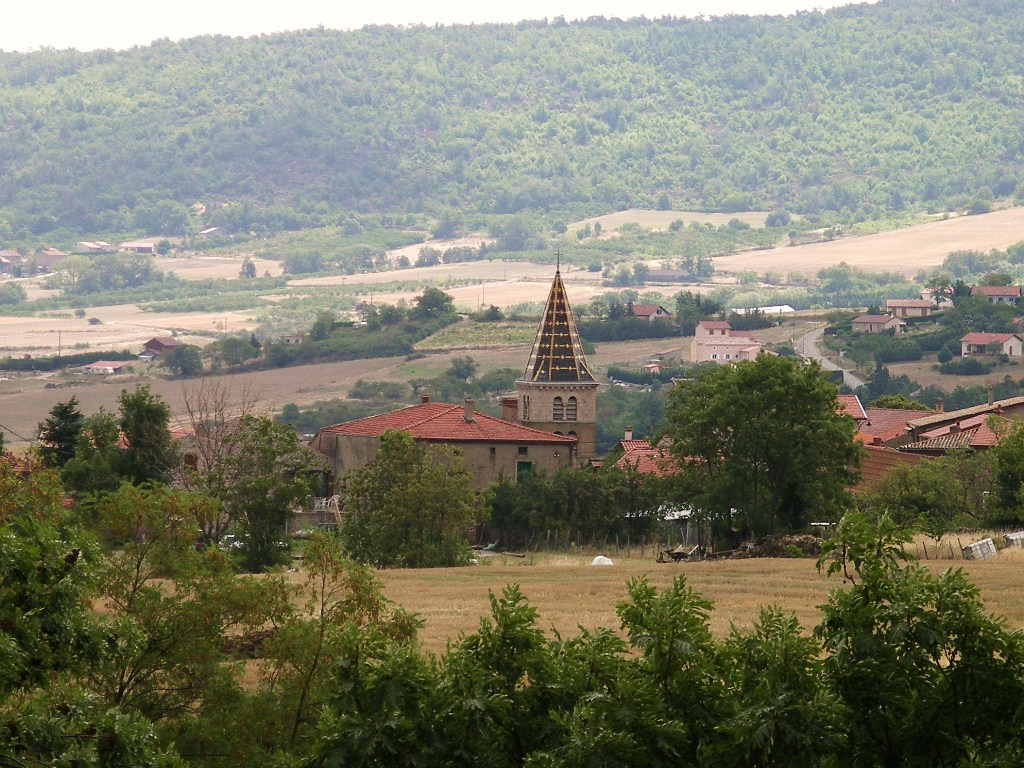 Commune de Saint Appolinard dans le Parc du Massif du Pilat (Loire)